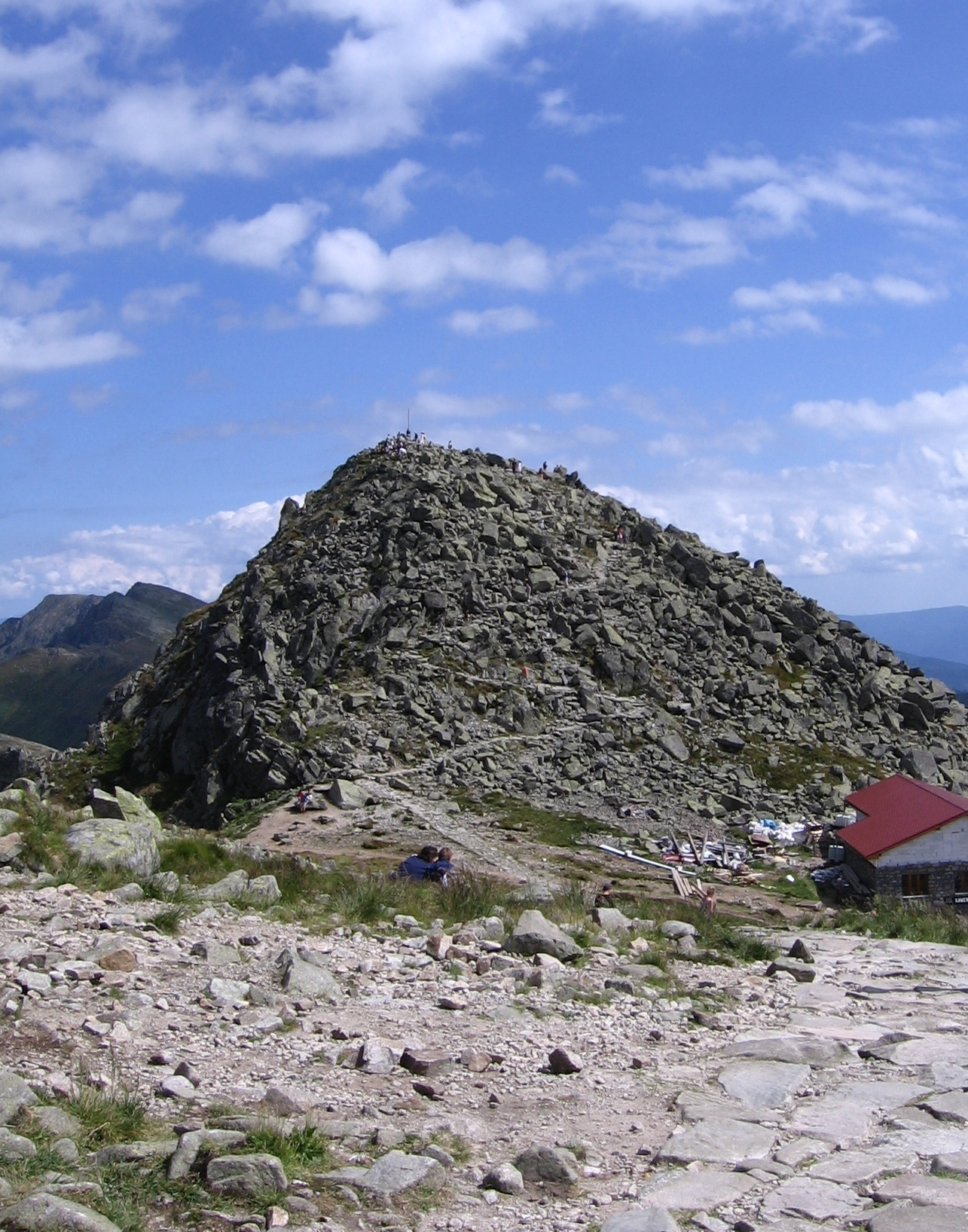 Szczyt Chopoka, w dole schronisko "Kamenna Chata"